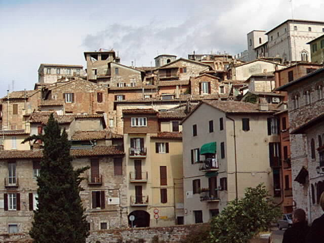 Perugia, Italia